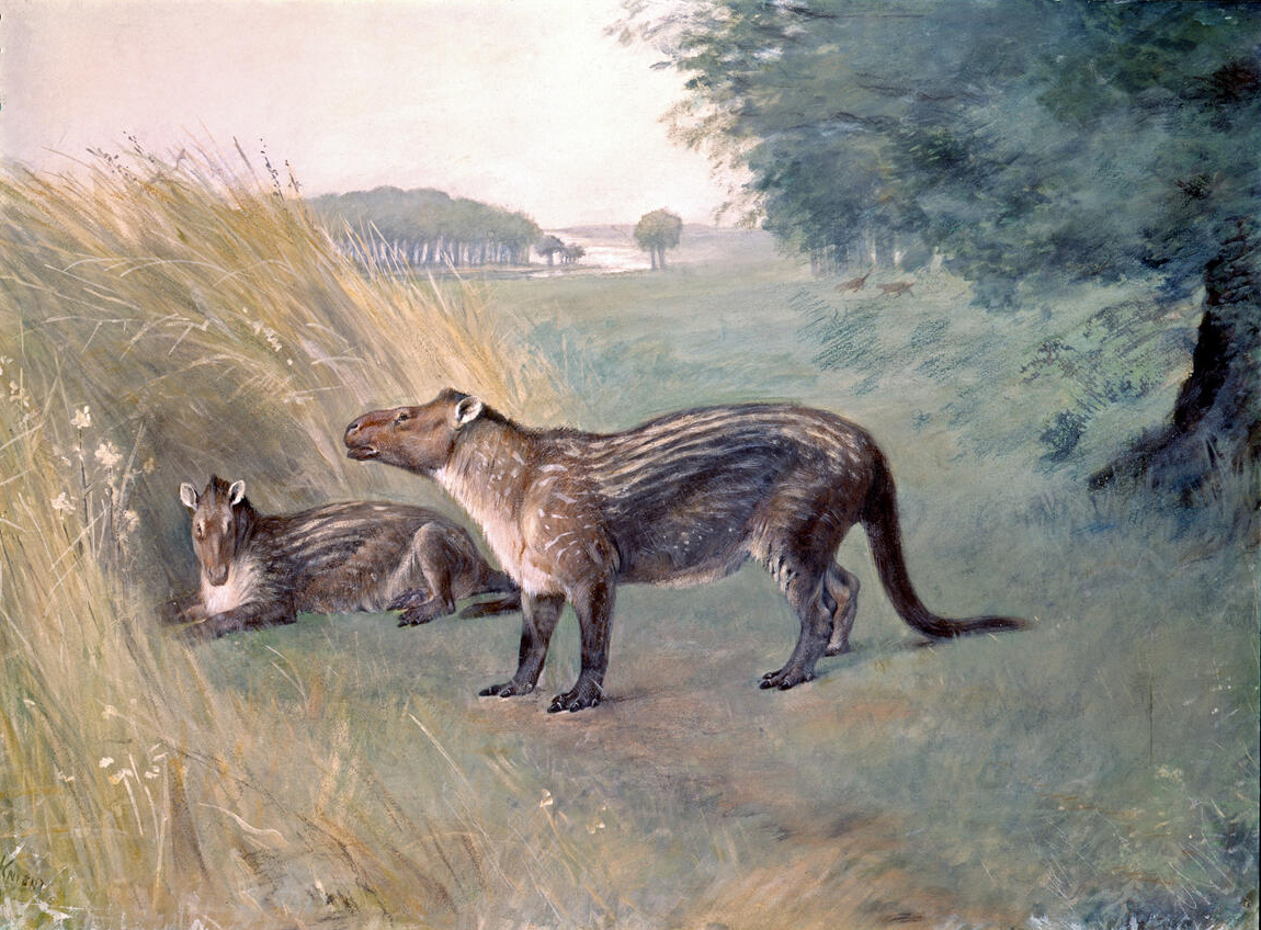 Phenacodus